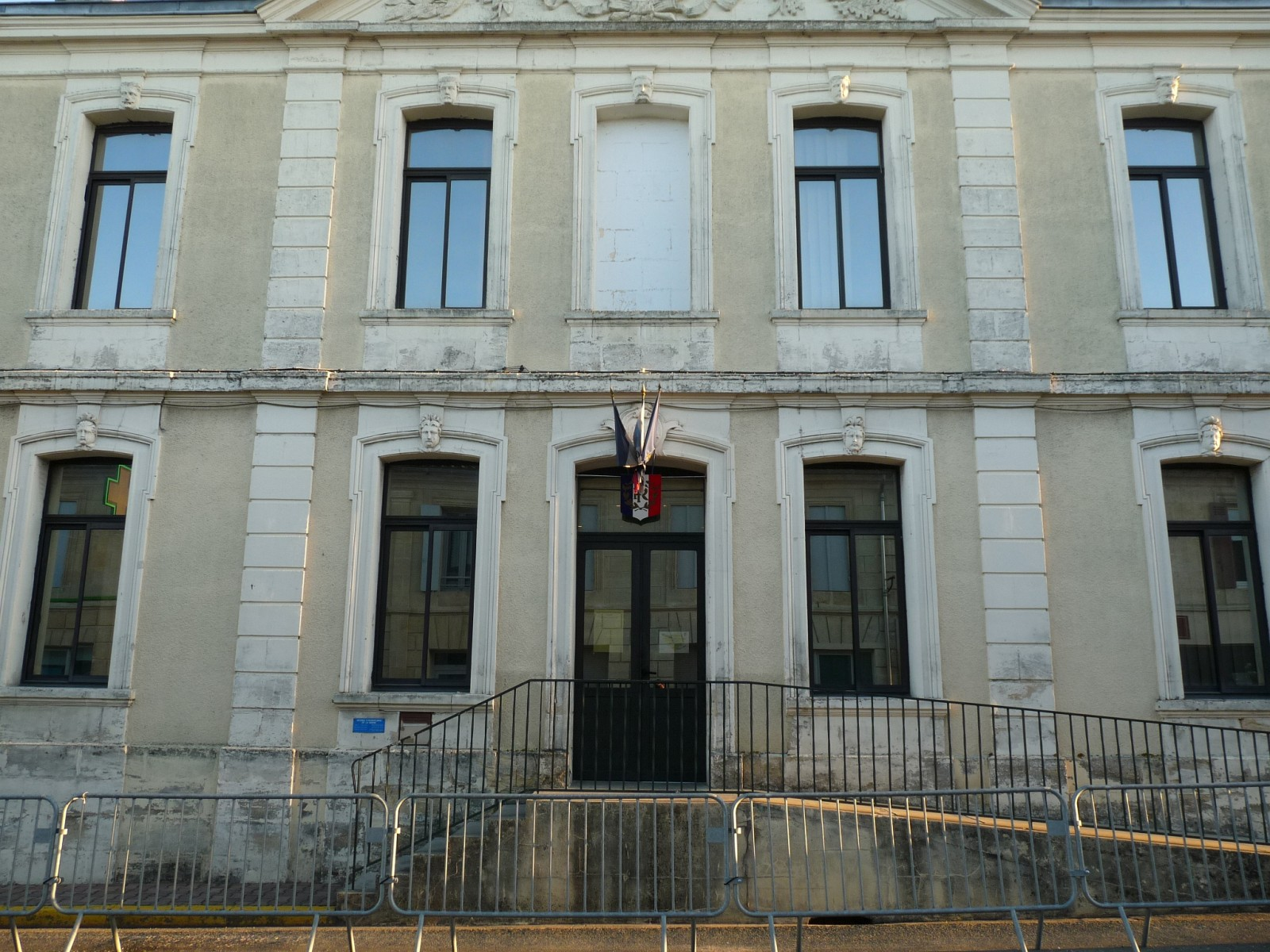 Mairie de Laruscade, Gironde, France